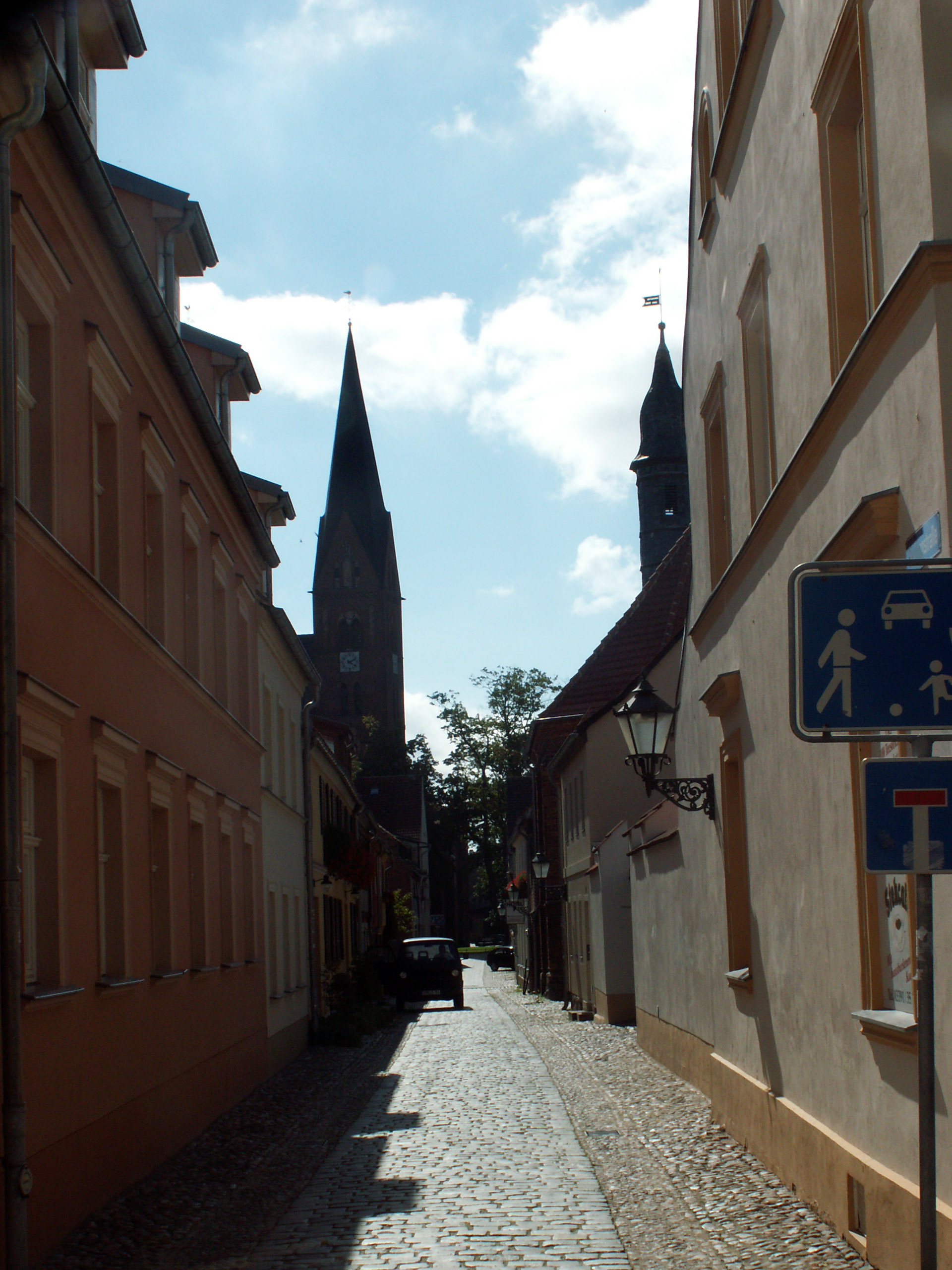 Aufgenommen auf einem Stadtrundgang durch Neuruppin.